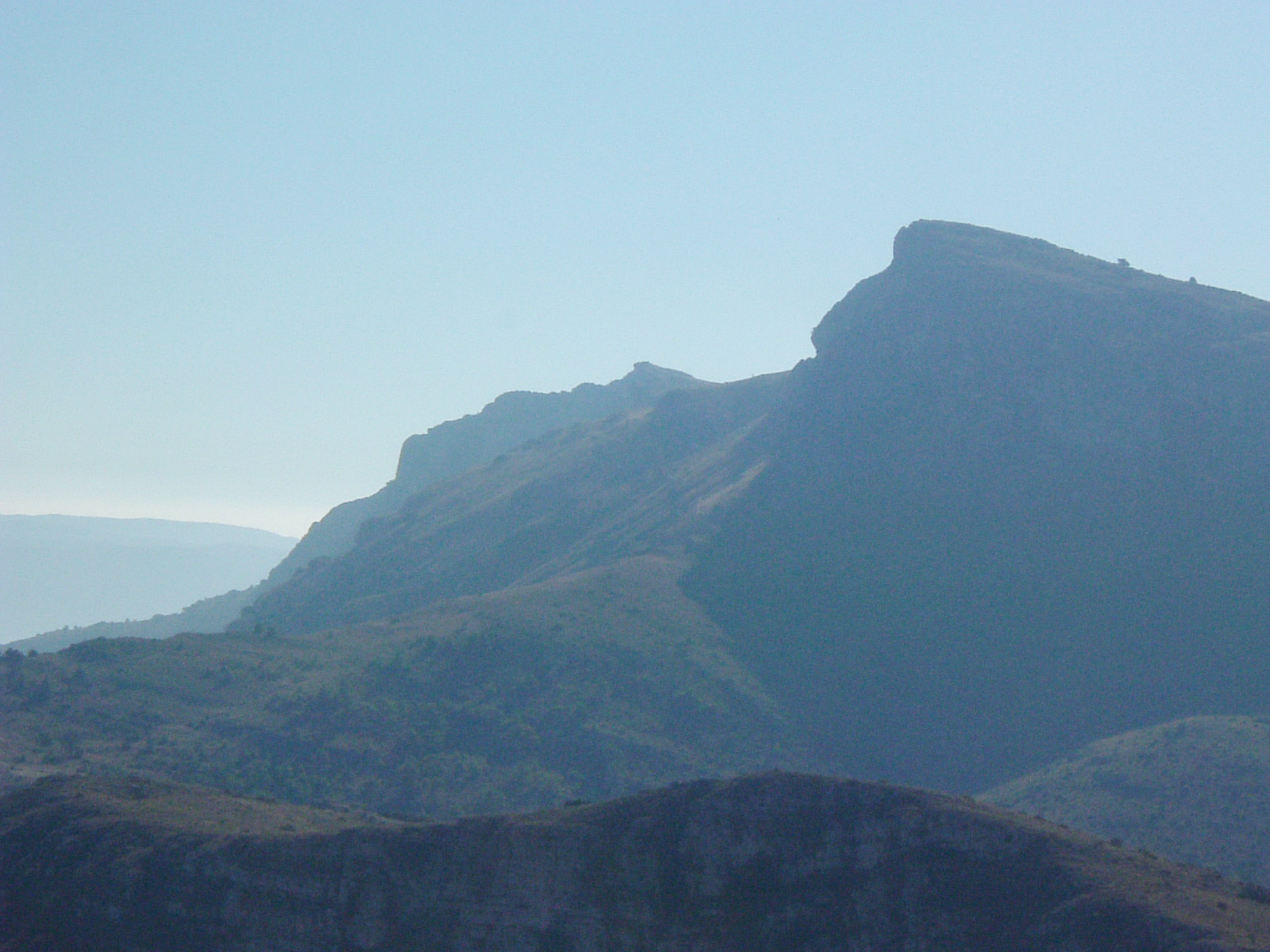 EL Montcabrer desde Agres